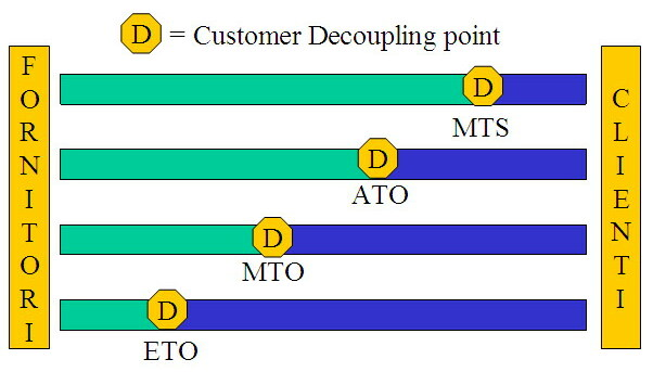 classificazione dei sistemi di produzione secondo Wortmann